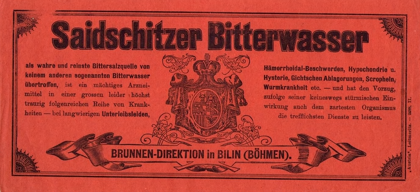 Etiketa Saidschitzer Bitterwasser 1885